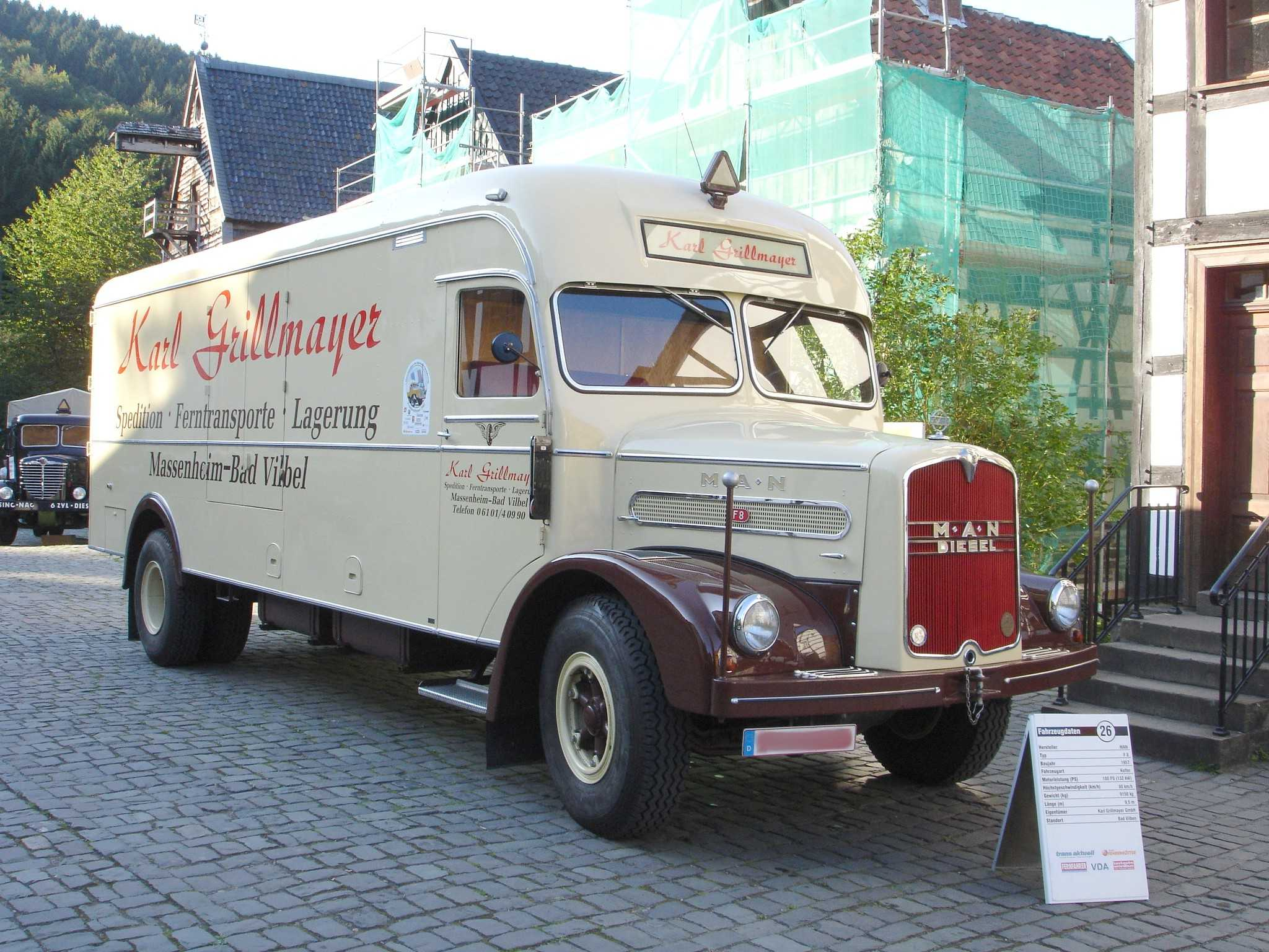 MAN Lkw Typ F8